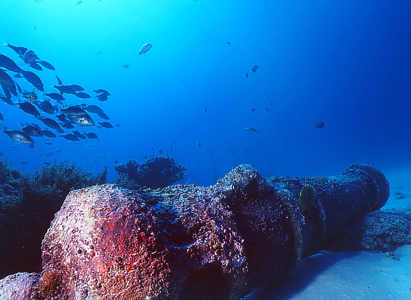 Scattata nelle acque di Mauritius con Nikonos 5 e 15 mm.